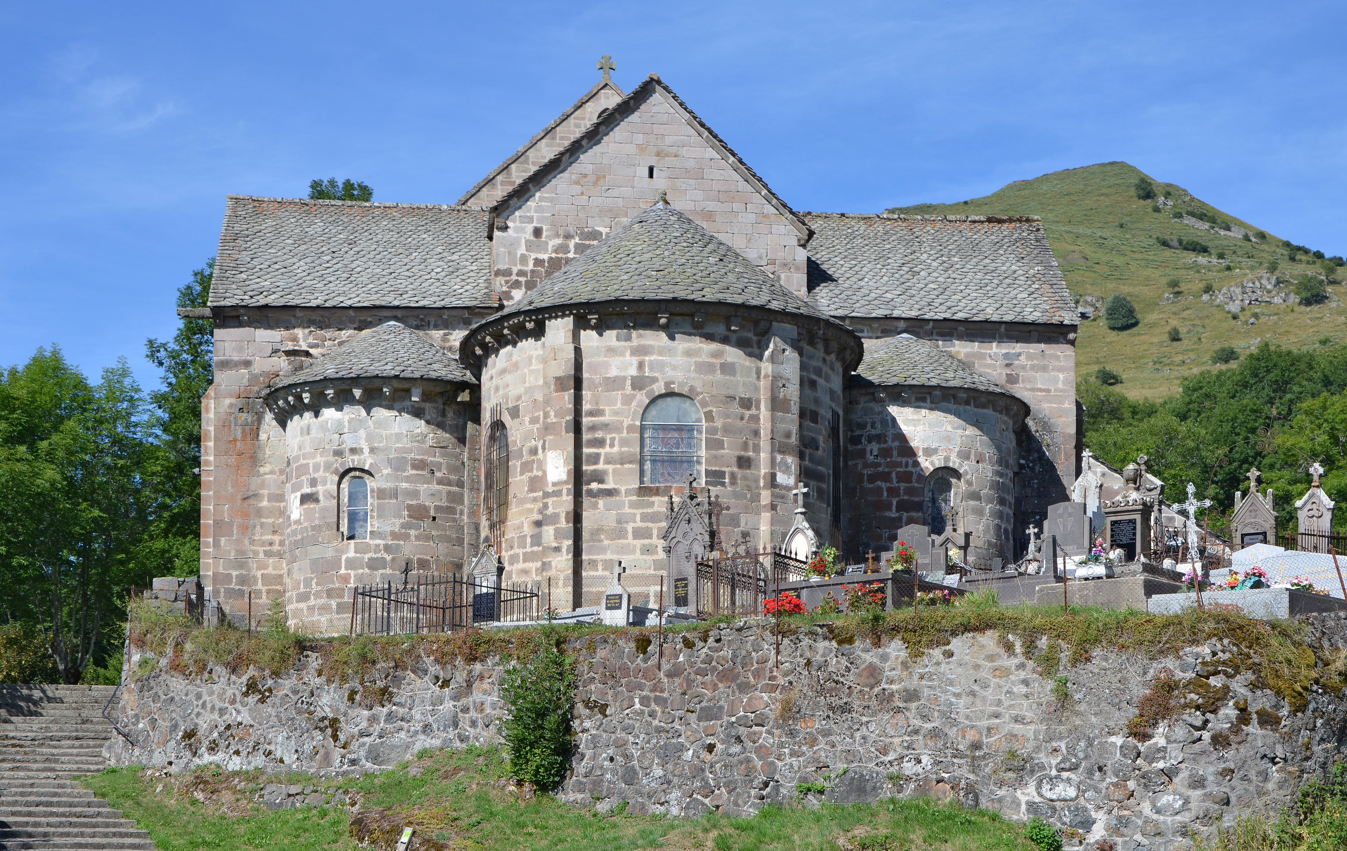 Eglise St-Cirgues, Dienne, Cantal, France .